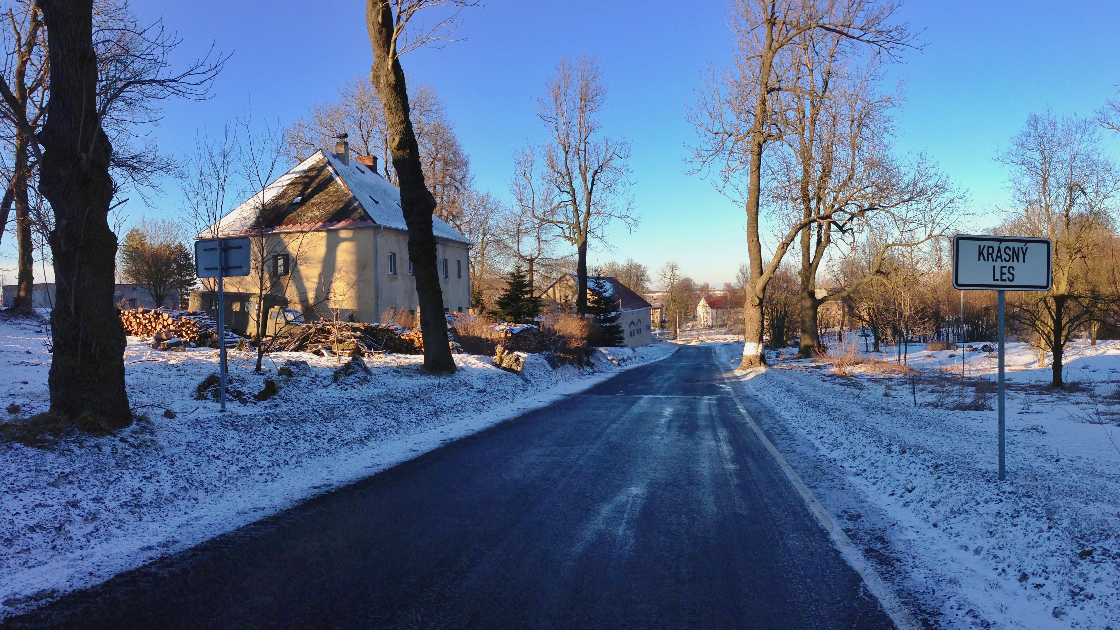 Příjezdová silnice do Krásného Lesa v Krušných horách z Nakléřova/Telnice.